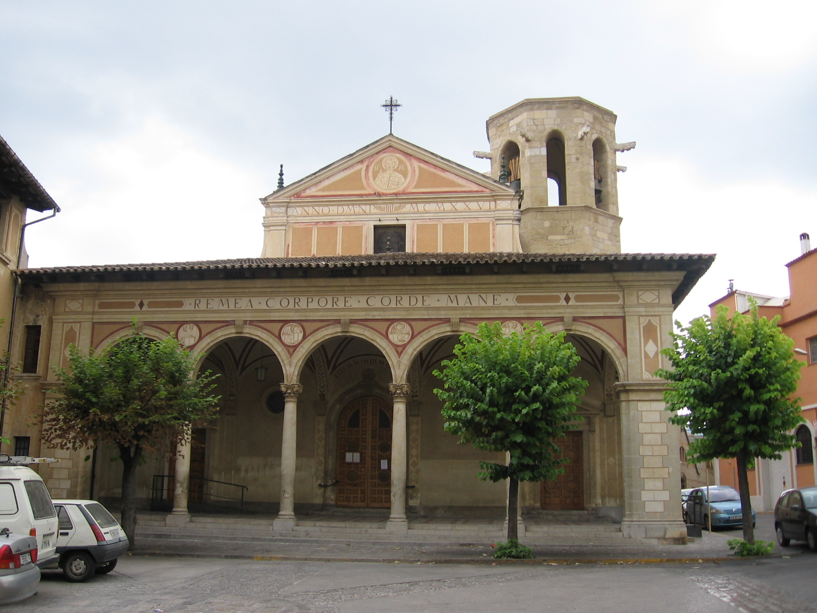 Iglesia